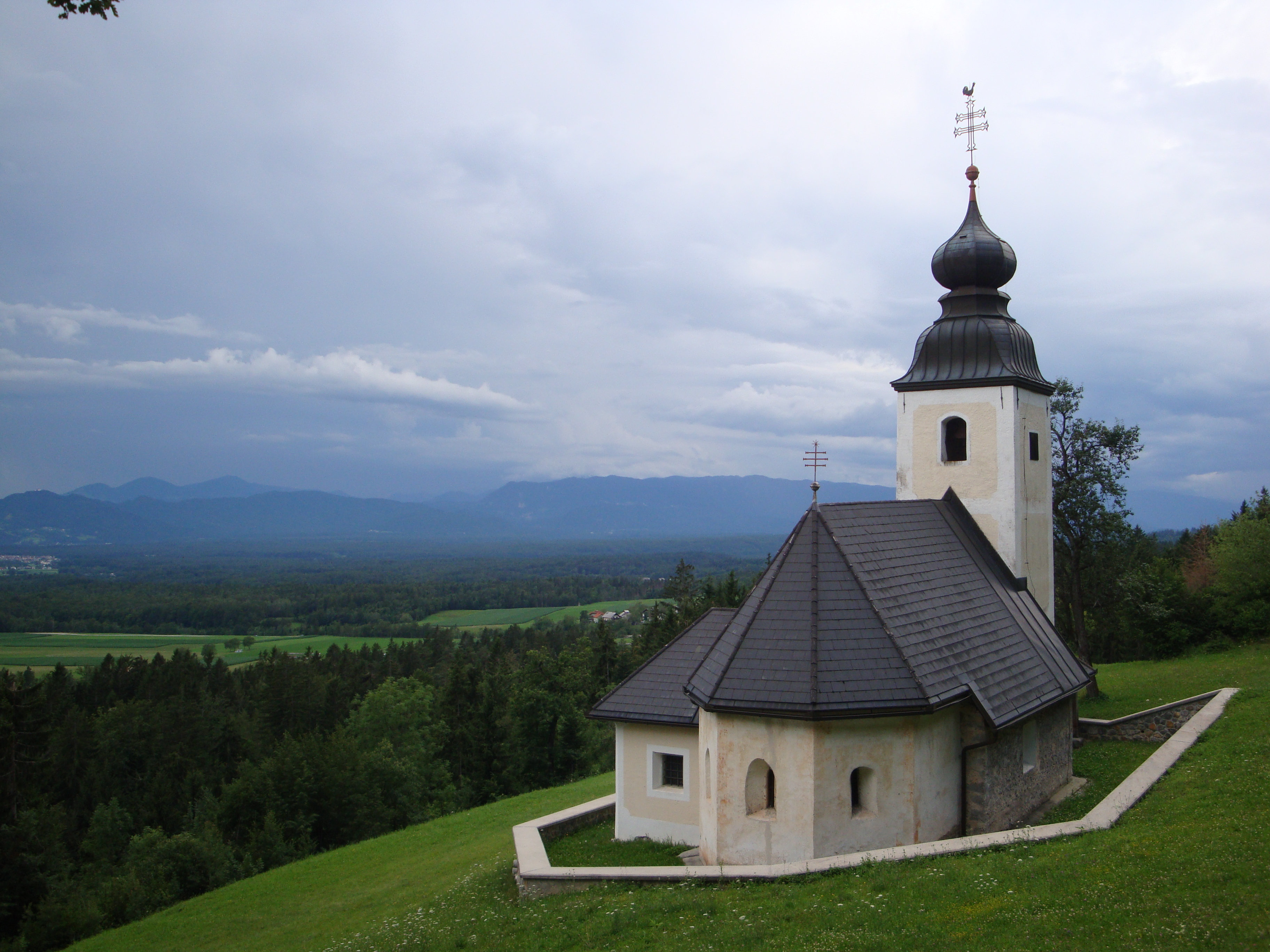 Cerkev sv. Miklavža nad Mačami, Slovenija.